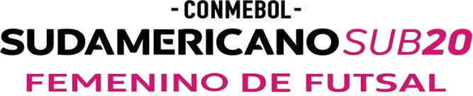 Logo del Campeonato Sudamericano Sub20 Femenino de Futsal